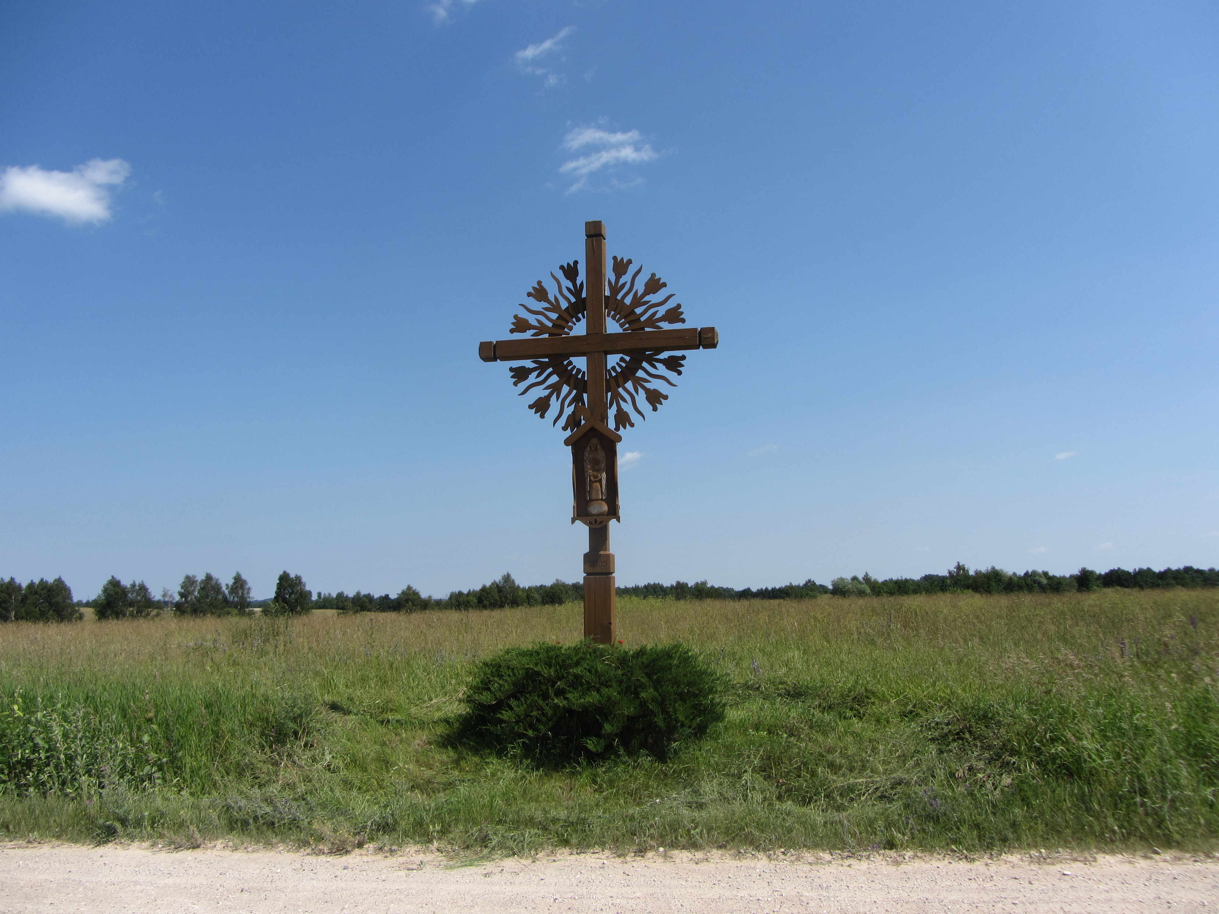 Rimšės sen., Lithuania